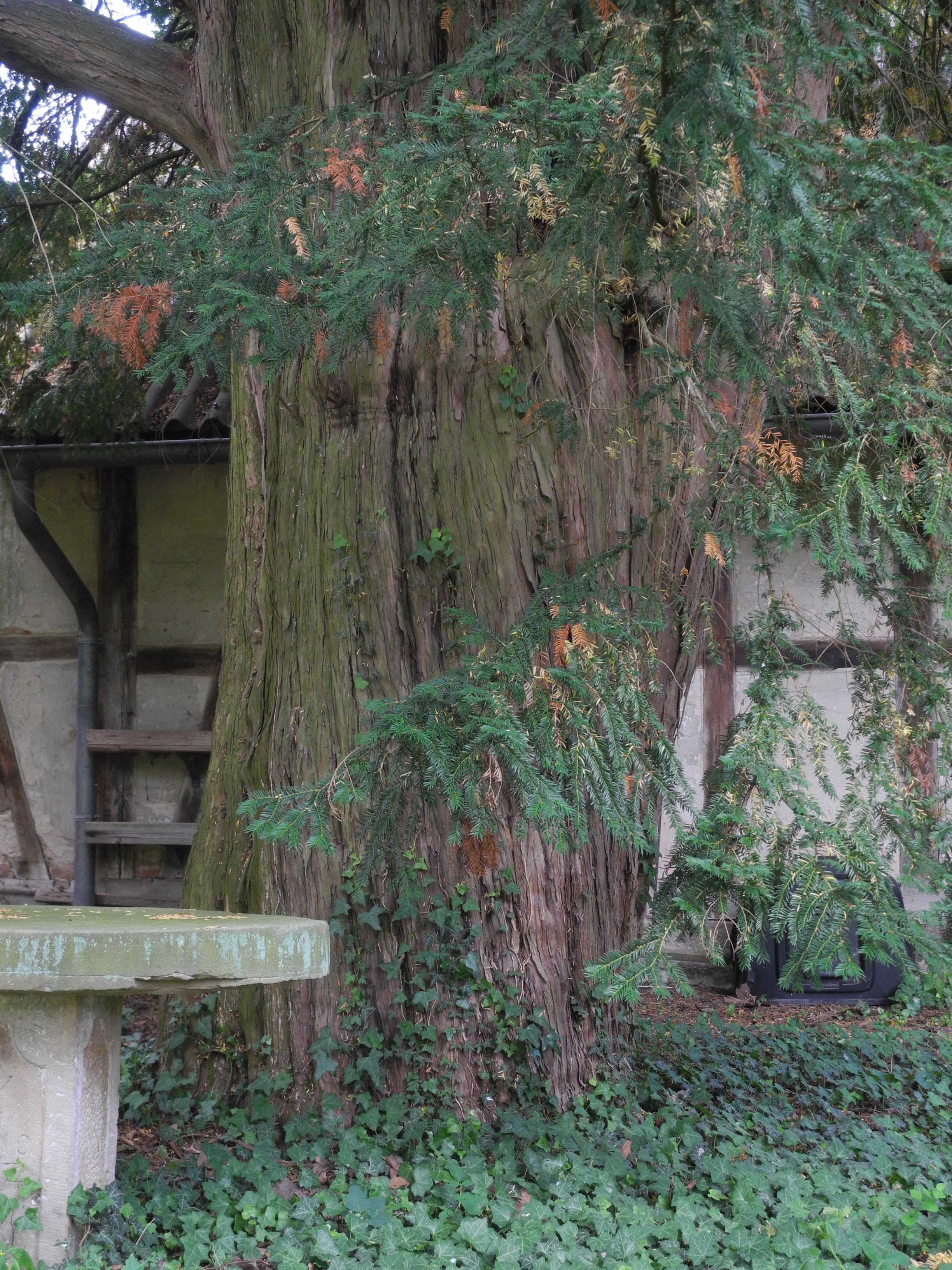 Naturdenkmal im Landkreis Kassel 6.33.017. Europäische Eibe (Taxus baccata) im Schlosspark Riede.